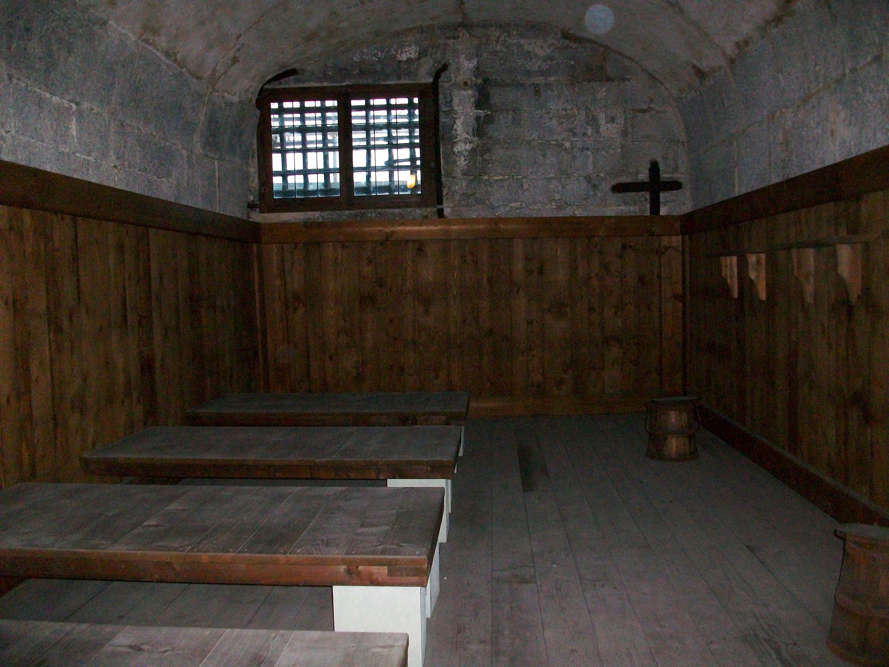 Cel·la, Prigioni Nuove, Venècia.